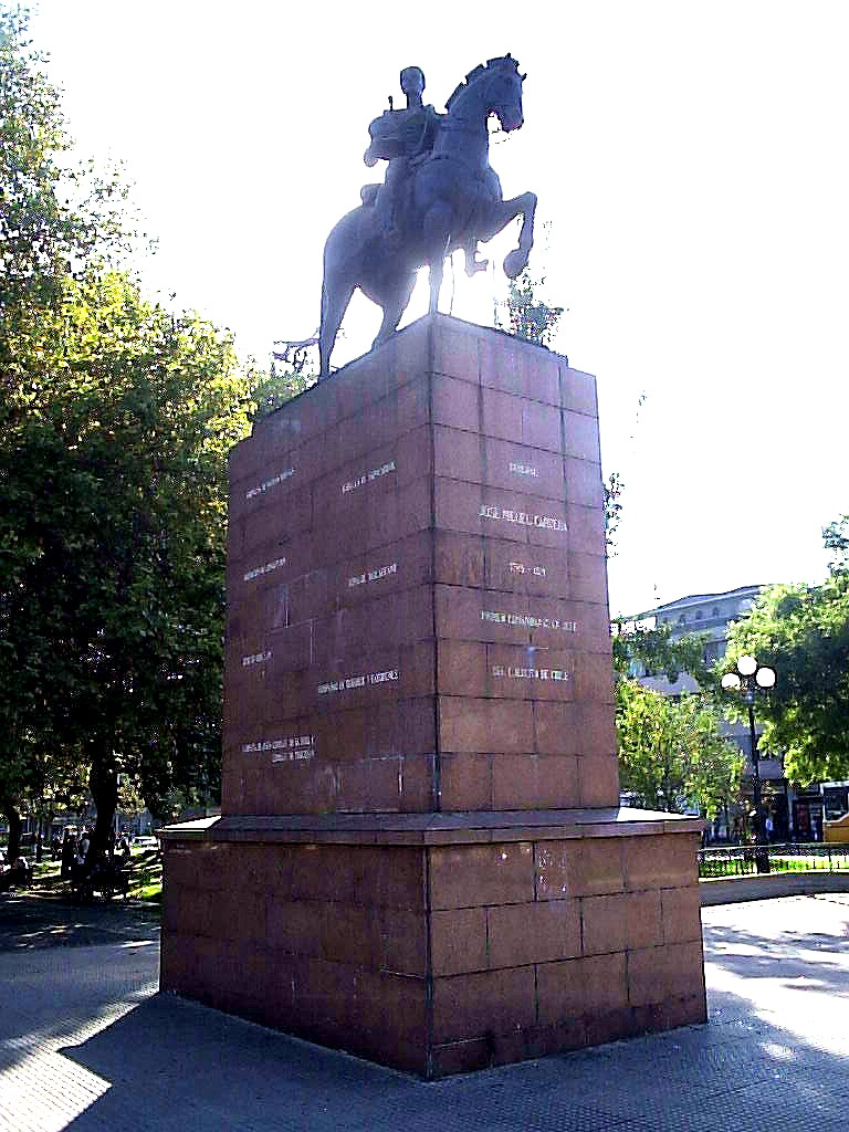 Estatua de José Miguel Carrera